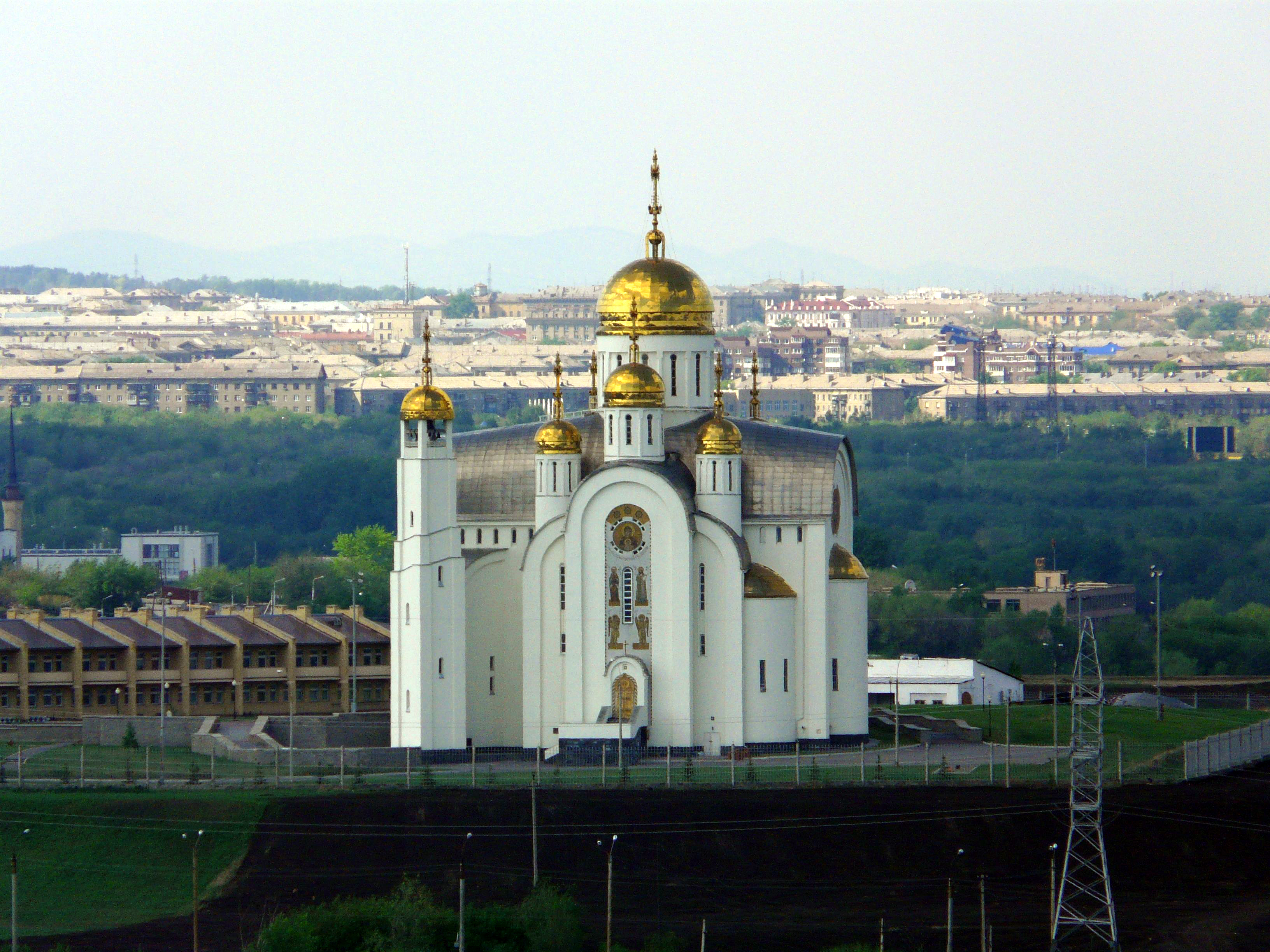 @ Храм днём